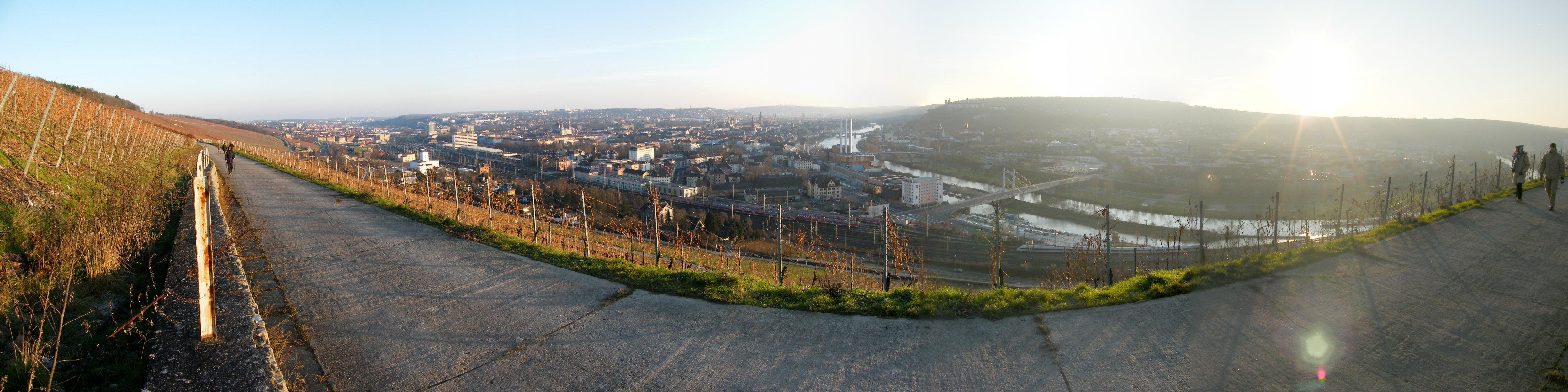 Panoramabild der Stadt Würzburg von der Steinburg aus